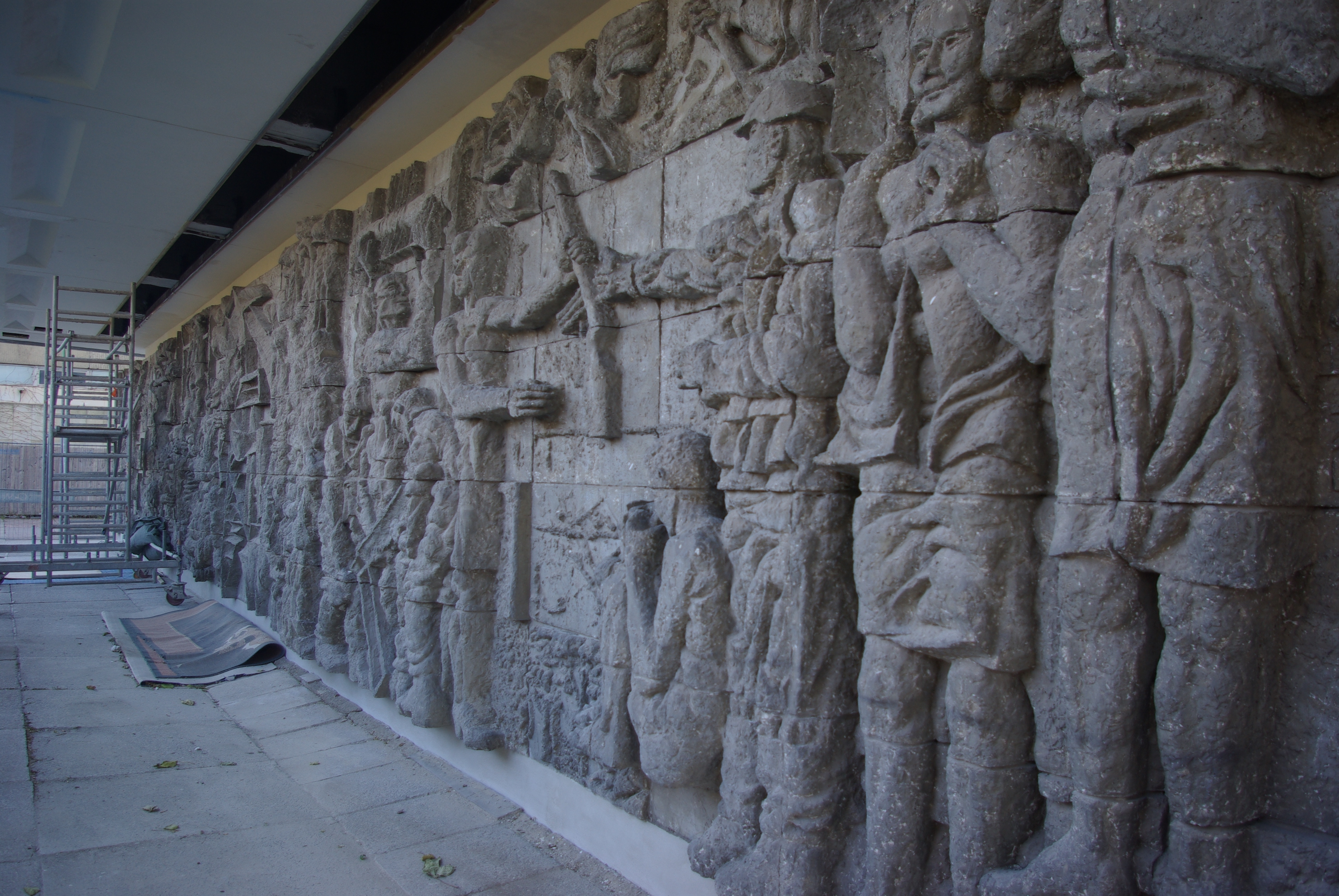 Cottbus in Brandenburg. Am Hochhaus Berliner Platz 1 befindet sich das Relief Geschichte der Arbeiterbewegung. Der Künstler war Rudolf Sitte.